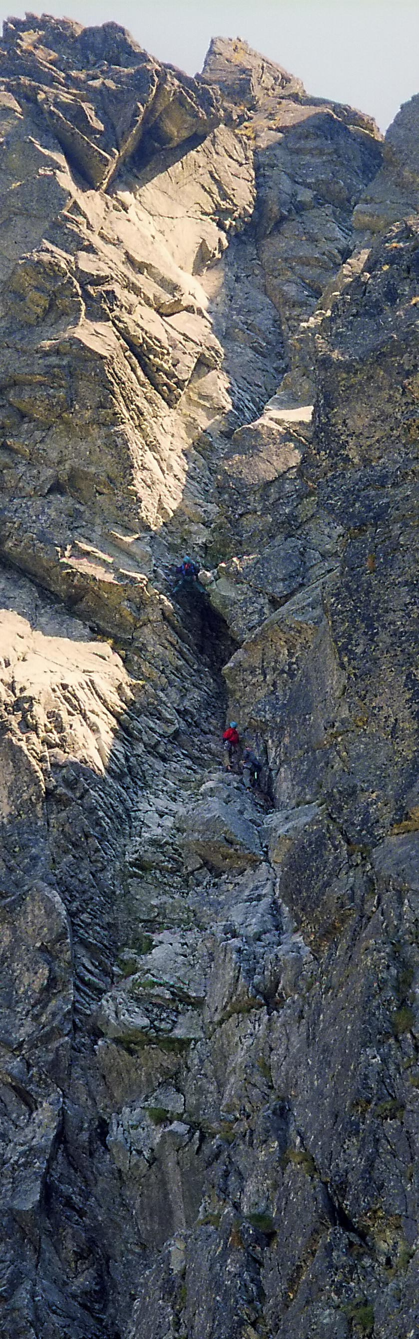 Komin Drège'a (Żleb Drège'a), przecinający zachodnią ścianę Granatów. W centrum zdjęcia trzyosobowy zespół wspinaczkowy, prowadzący pokonuje właśnie najtrudniejsze, szóstkowe miejsce drogi. Jestem autorem tego zdjęcia - Andrzej Makarczuk